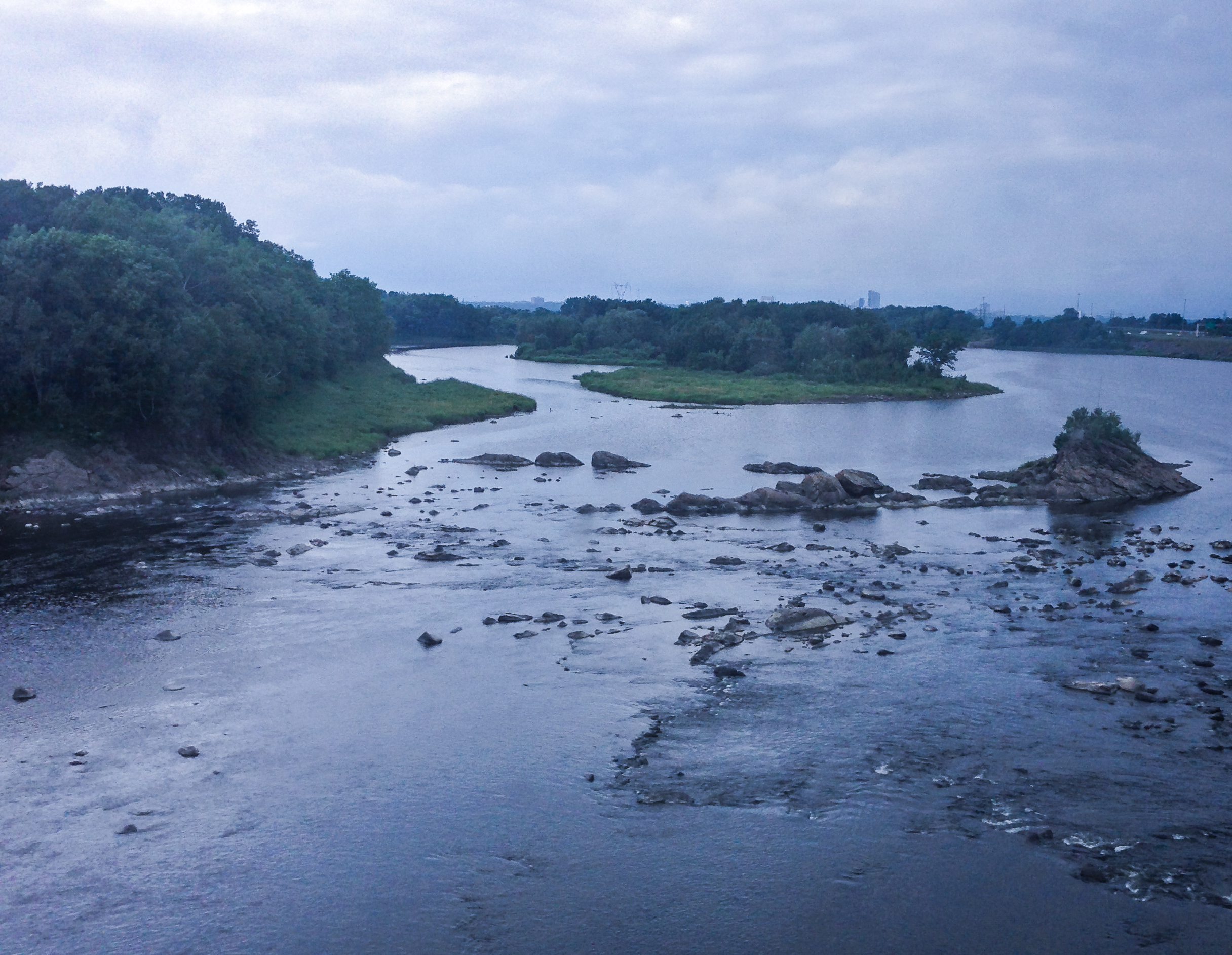 Rivière Chaudière, Quebec